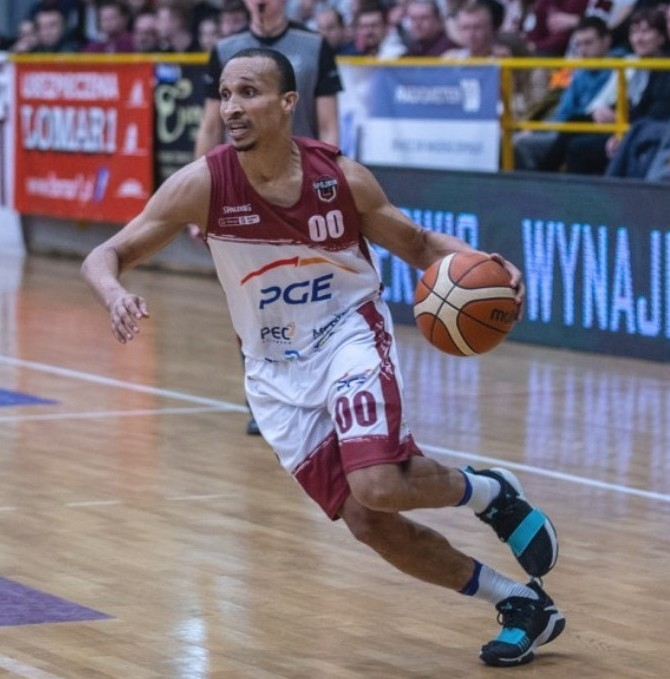 Adris De León